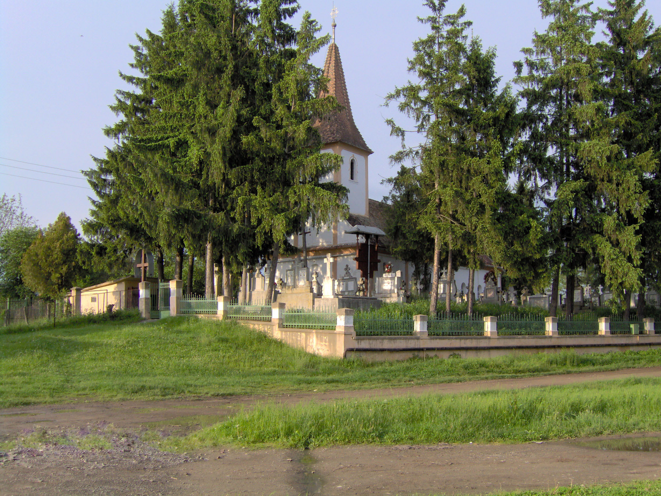 Biserica ortodoxa din Beclean, judetul Brasov ( construita: 1804 )